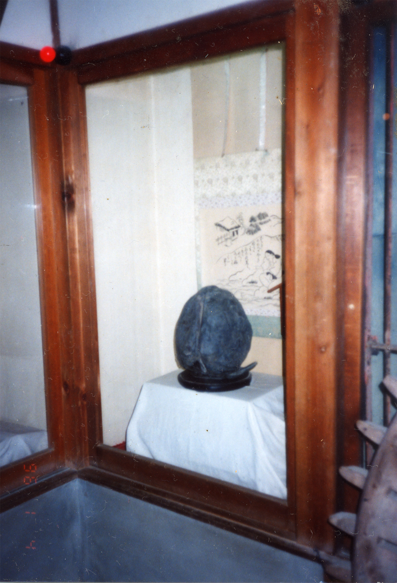 残念ながら放火により焼失した、桃太郎が生まれたという桃